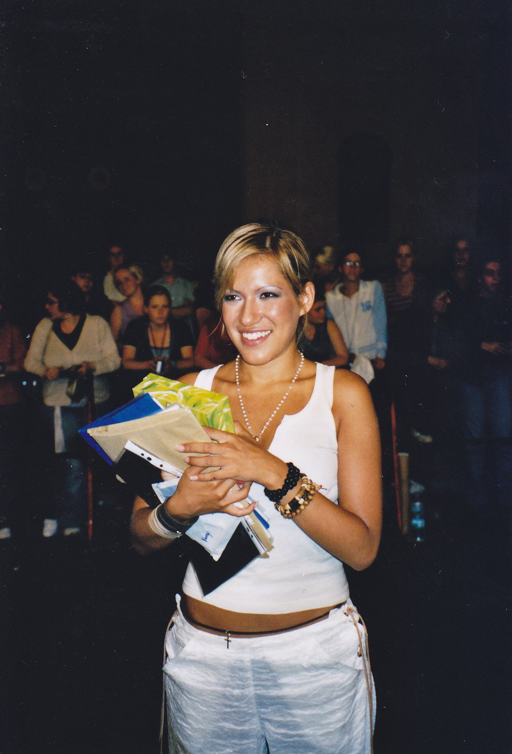 Vanessa Petruo "Vany" von den No Angels